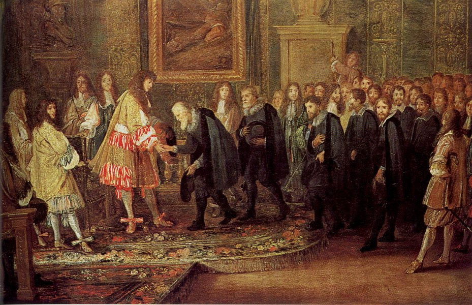 Ludwig XIV. empfängt 1663 eine Delegation aus der Eidgenossenschaft unter der Führung des Zürcher Bürgermeisters Johann Heinrich Waser anlässlich des Abschlusses einer neuen Soldallianz zwischen Frankreich und allen XIII eidgenössischen Kantonen sowie den Zugewandten. Der Empfang fand im Louvre statt.